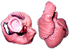 HVMB model made by Francisco Torrent-Guasp